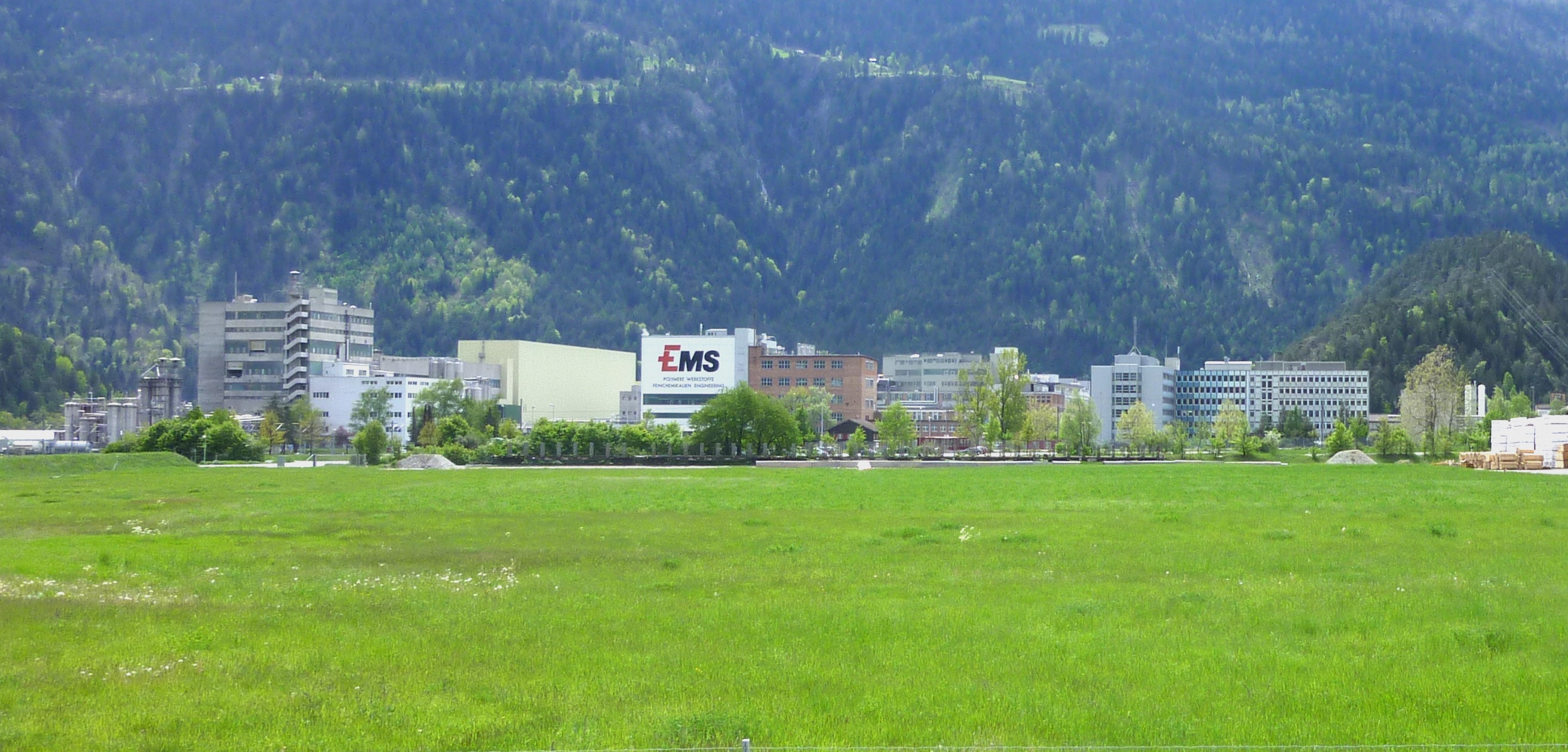 Domat/Ems Kirche Ems-Chemie